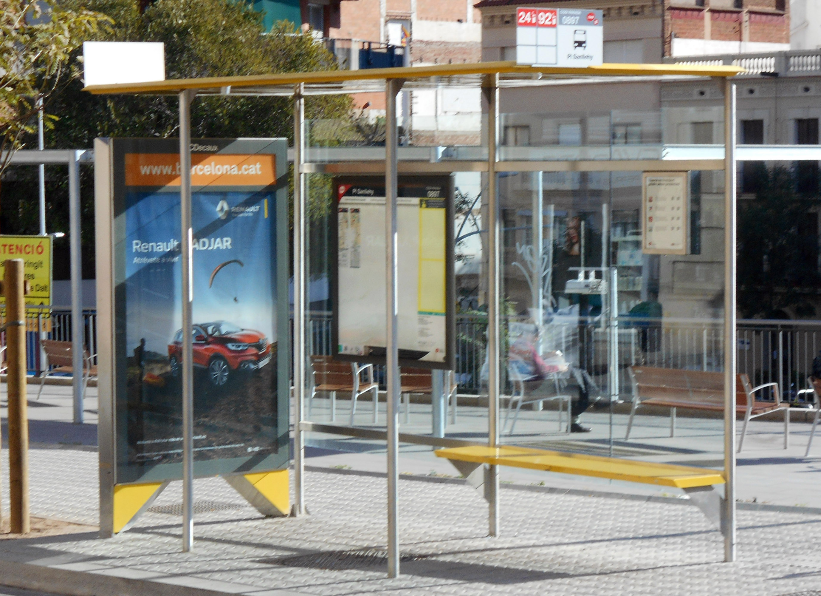 Marquesina modelo Pal·li, de Josep Lluís Canosa, Elías Torres y José Antonio Martínez Lapeña.